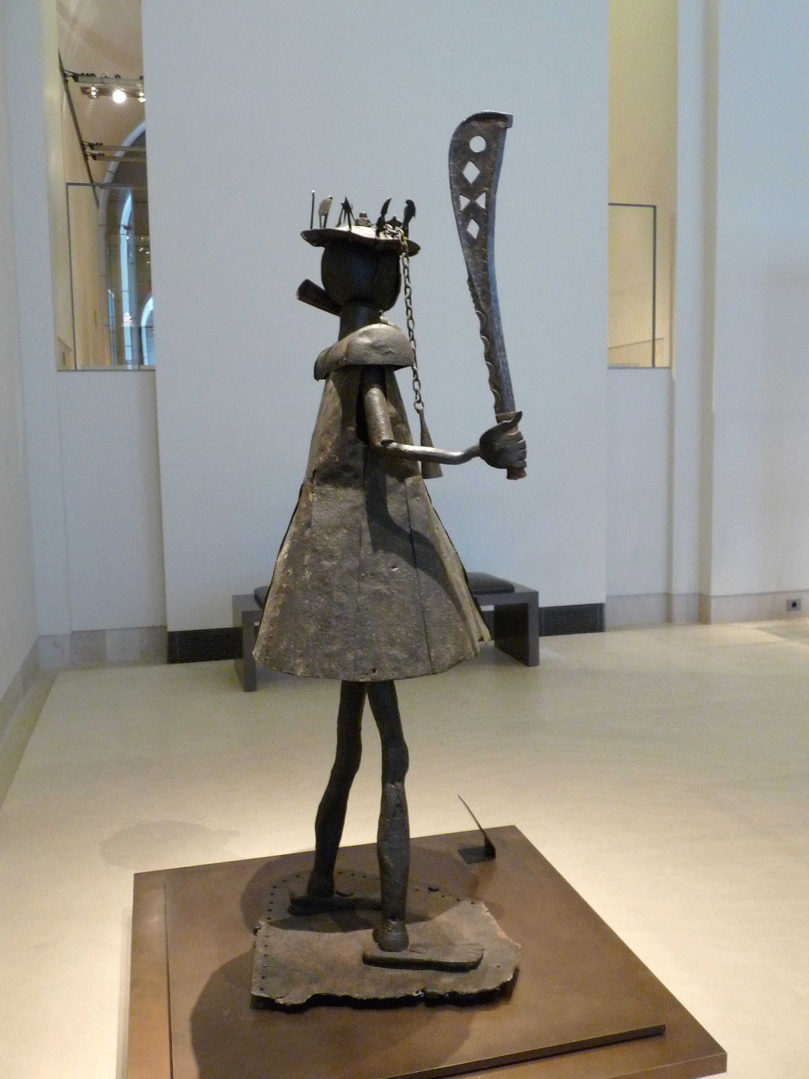 Sculpture fon en fer attribuée à Akati Ekplékendo. République du Bénin. Avant 1858. Statue dédiée à Gou, divinité du fer et de la guerre. Pavillon des Sessions, Louvre, Paris